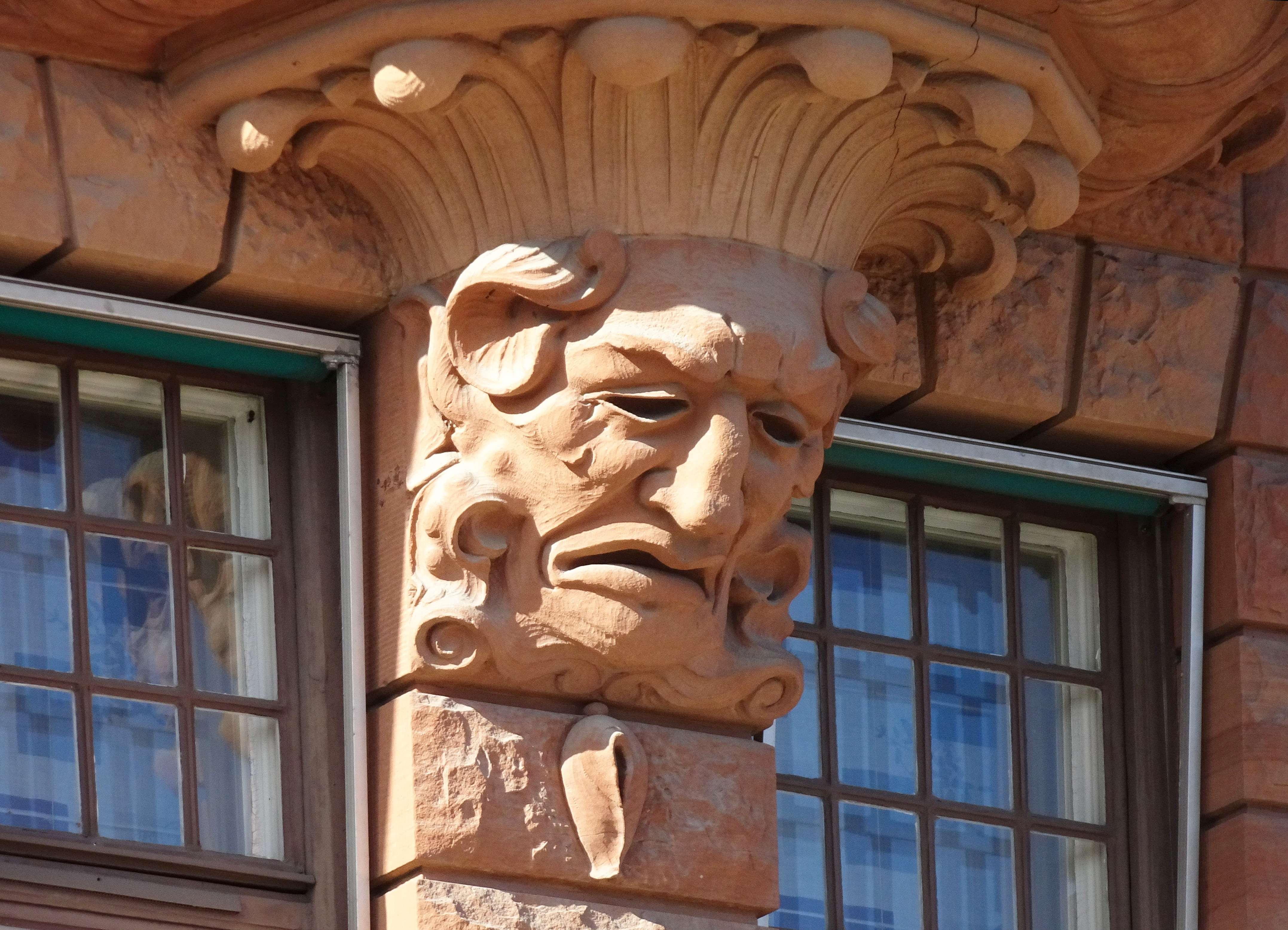 Hanrejen på fasaden Skeppsbron 44